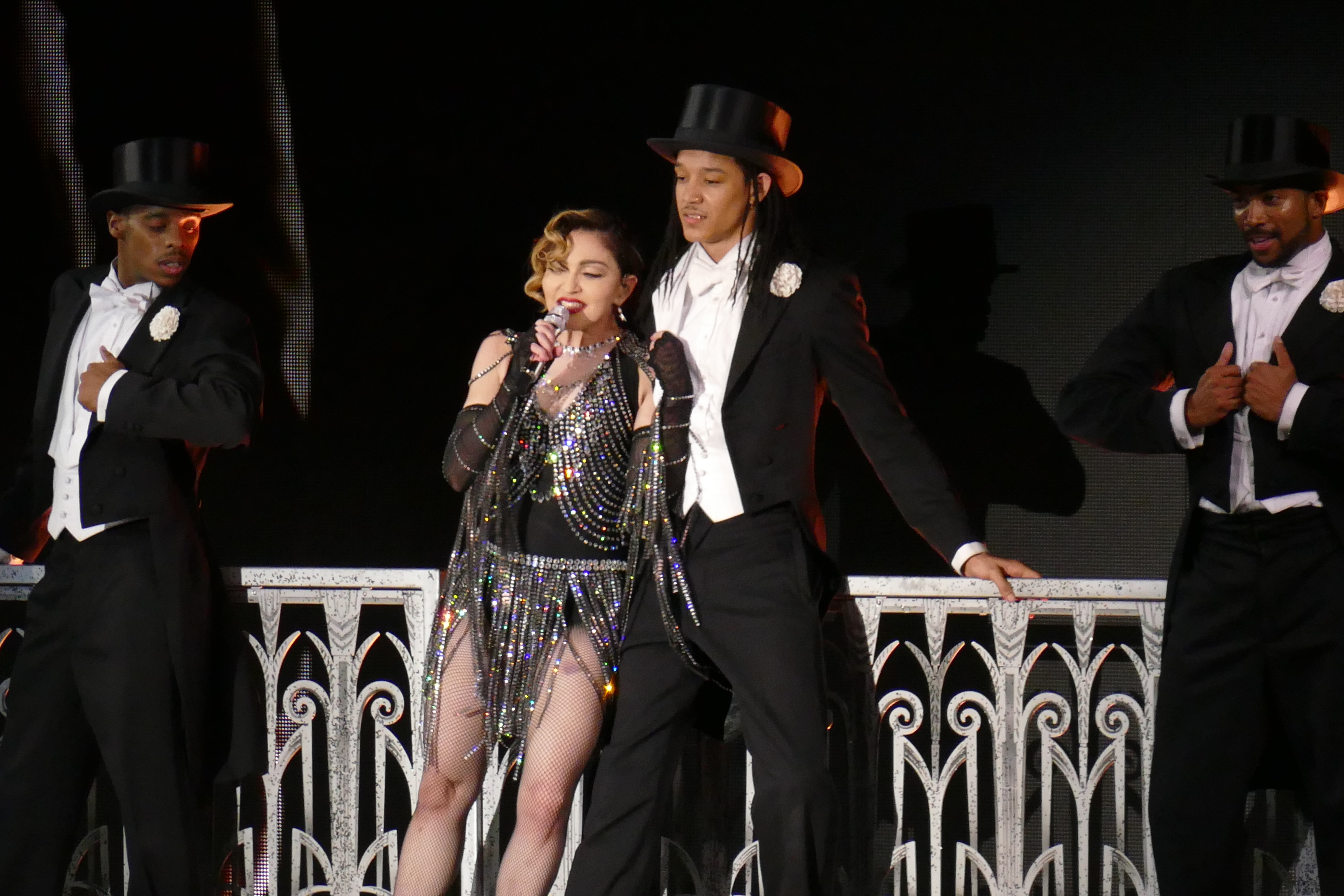 taipei_madonna_concert-433